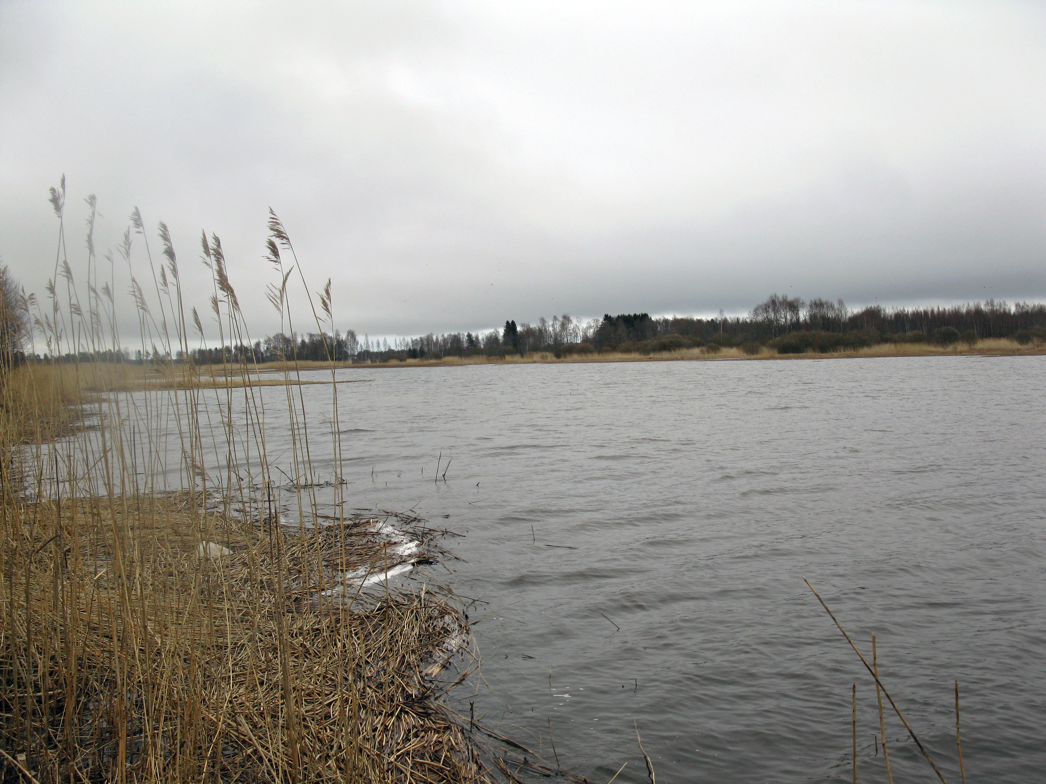 Eurajoensalmea Eurajoen Verkkkokarin luona huhtikuussa 2016.